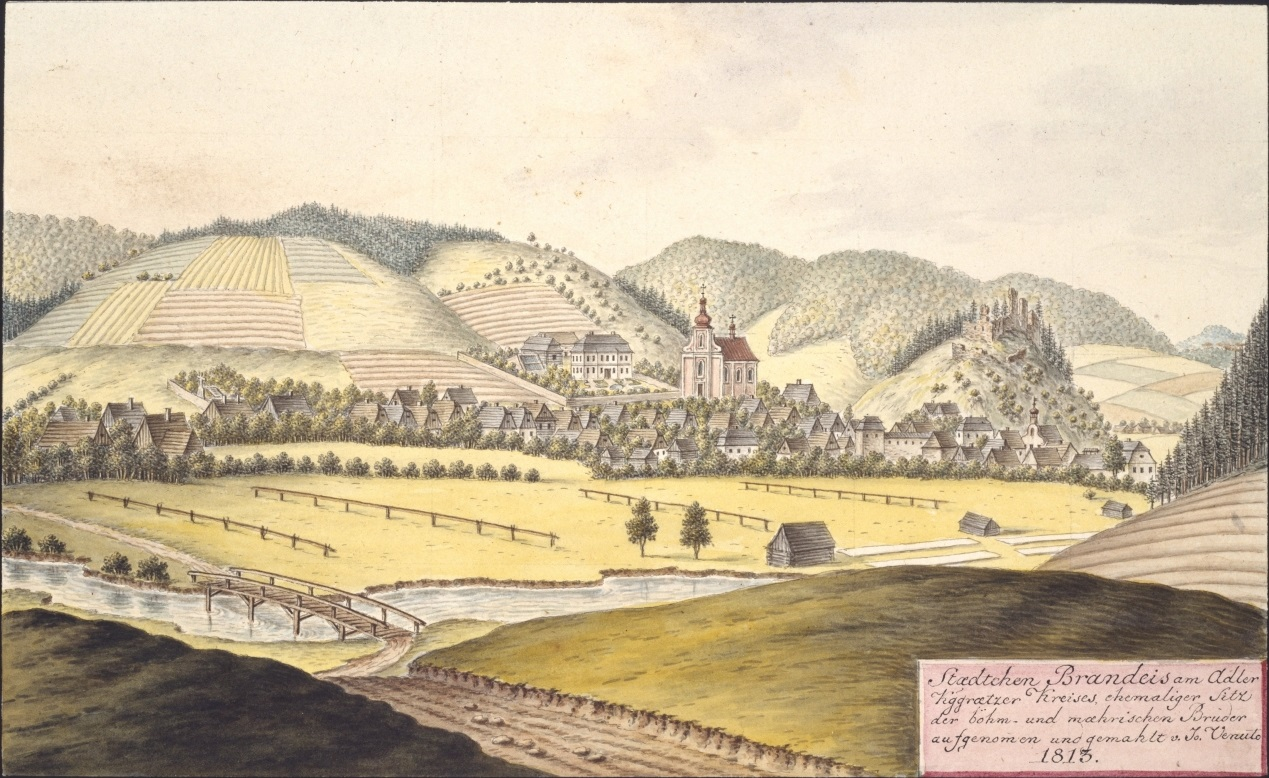 Brandýs nad Orlicí. Staedtchen Brandeis am Adler Kggrätzer Kreises, ehemaliger Sitz der böhm- und maehrischen Brüder aufgenomen und gemahlt v. Jo. Venuto 1813